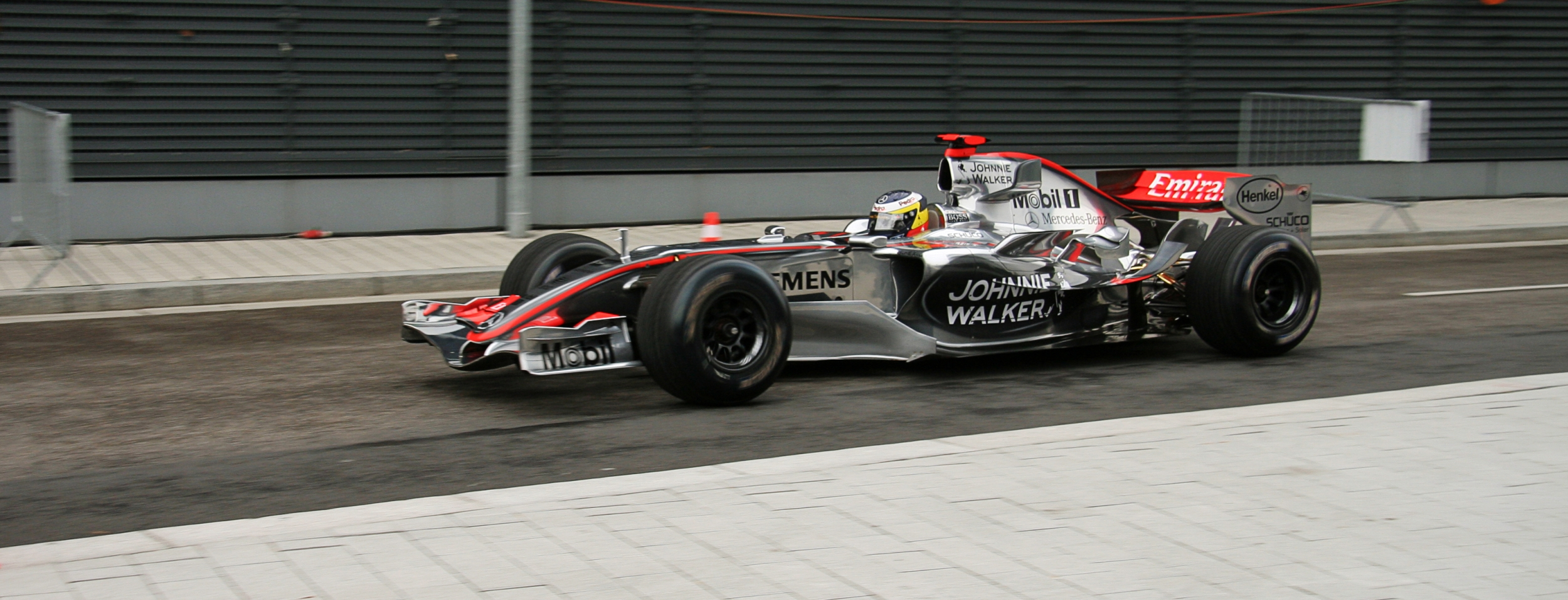 McLaren-Mercedes F1 car 2006 (MP4-21) / Pedro de la Rosa (driver)